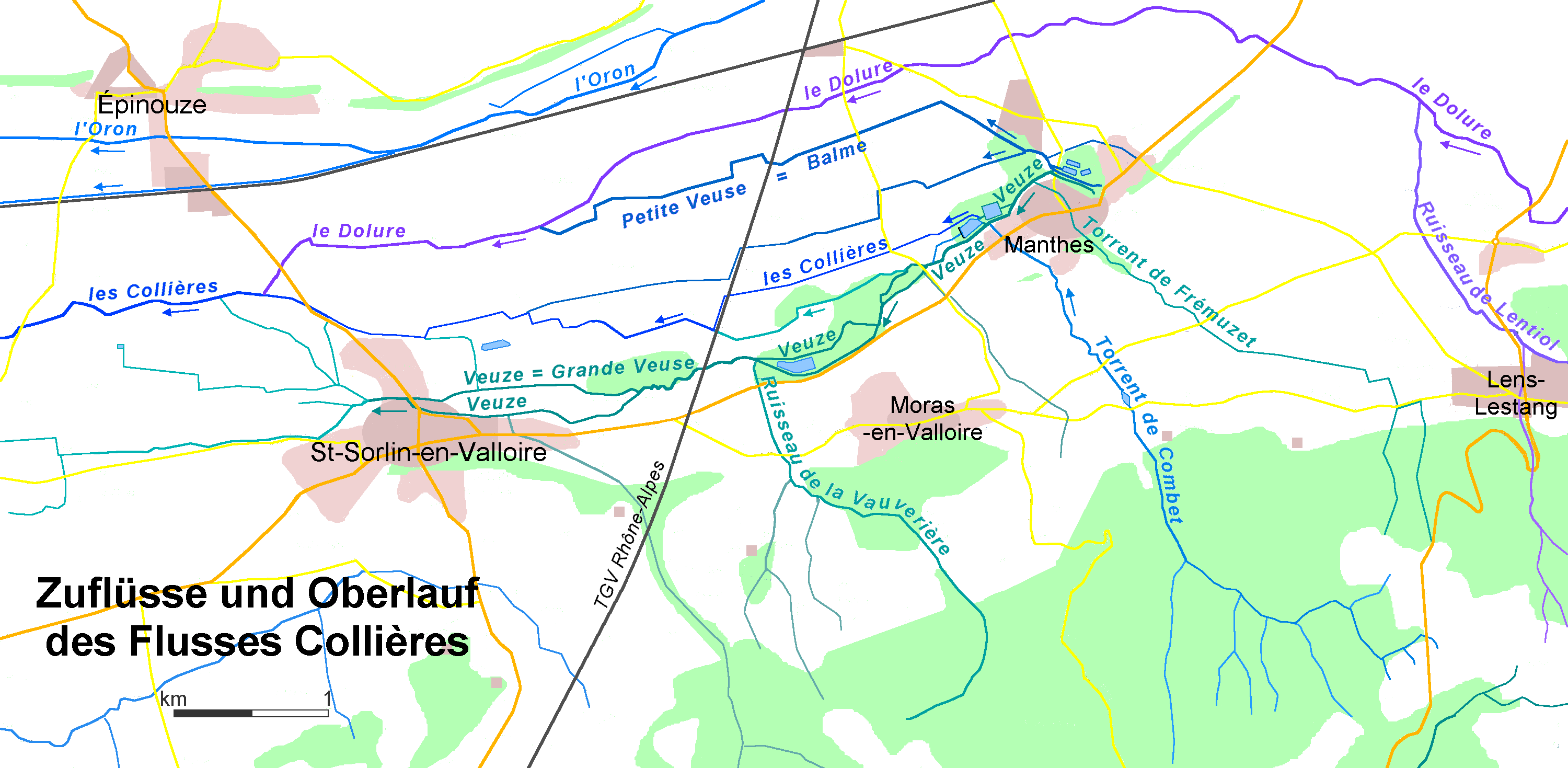 Les relations des Collières avec le Torrent la Veuze ou Grande Veuse et avec le Torrent de Combet sont un peu compliqiées.